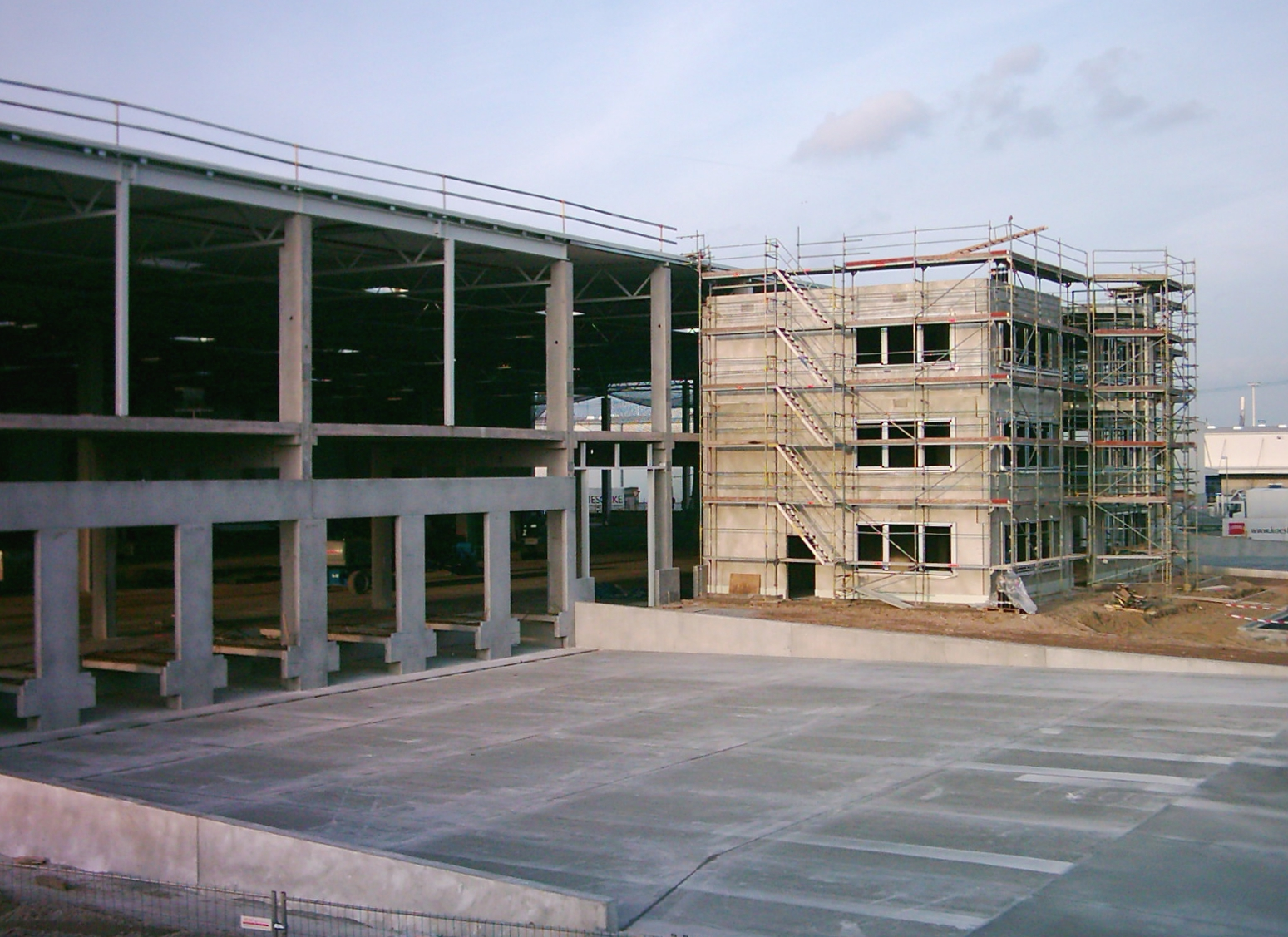 Neubau an der Finkenwerder Straße, Hamburg.